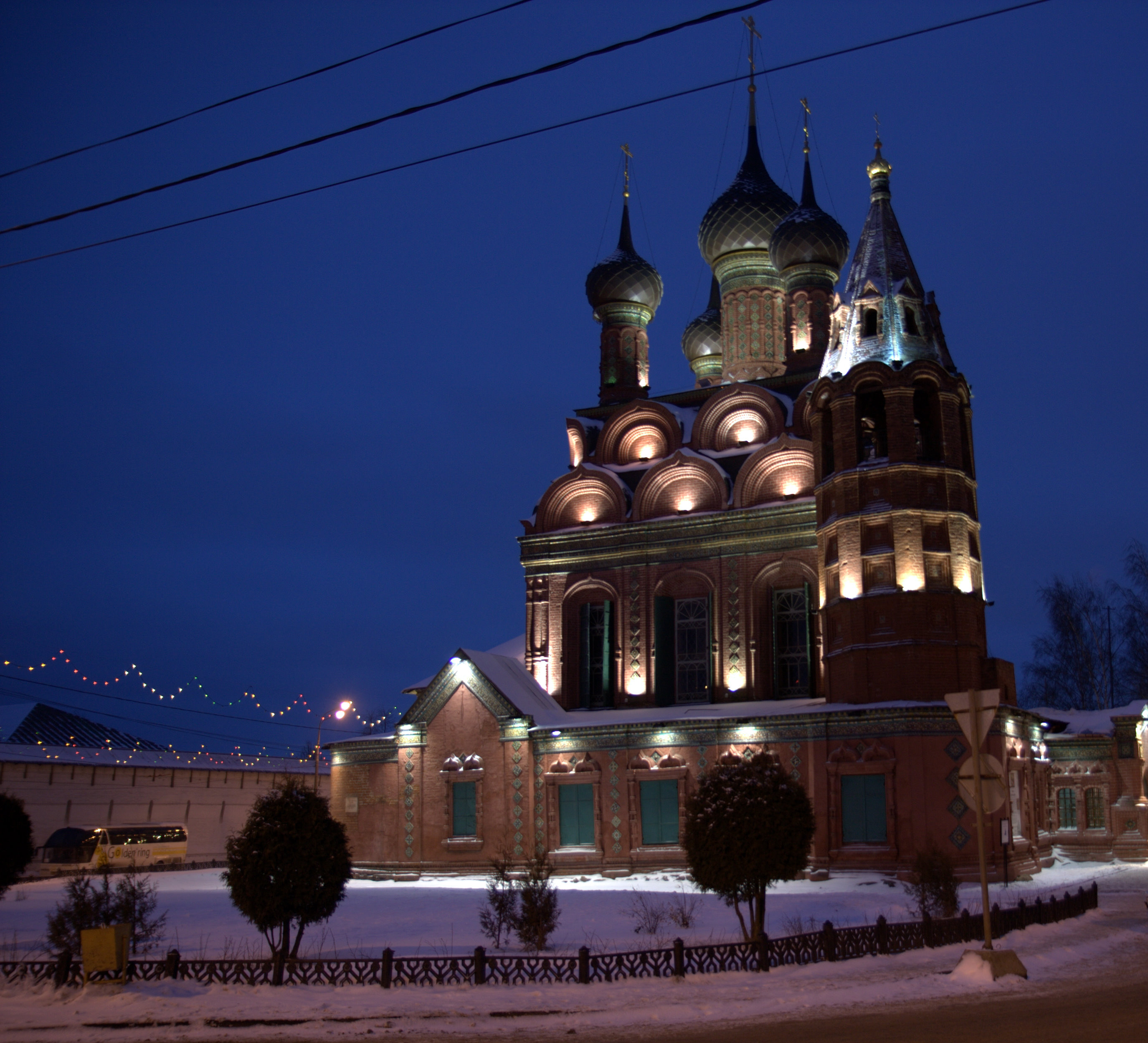 Церковь Богоявления (Ярославль)